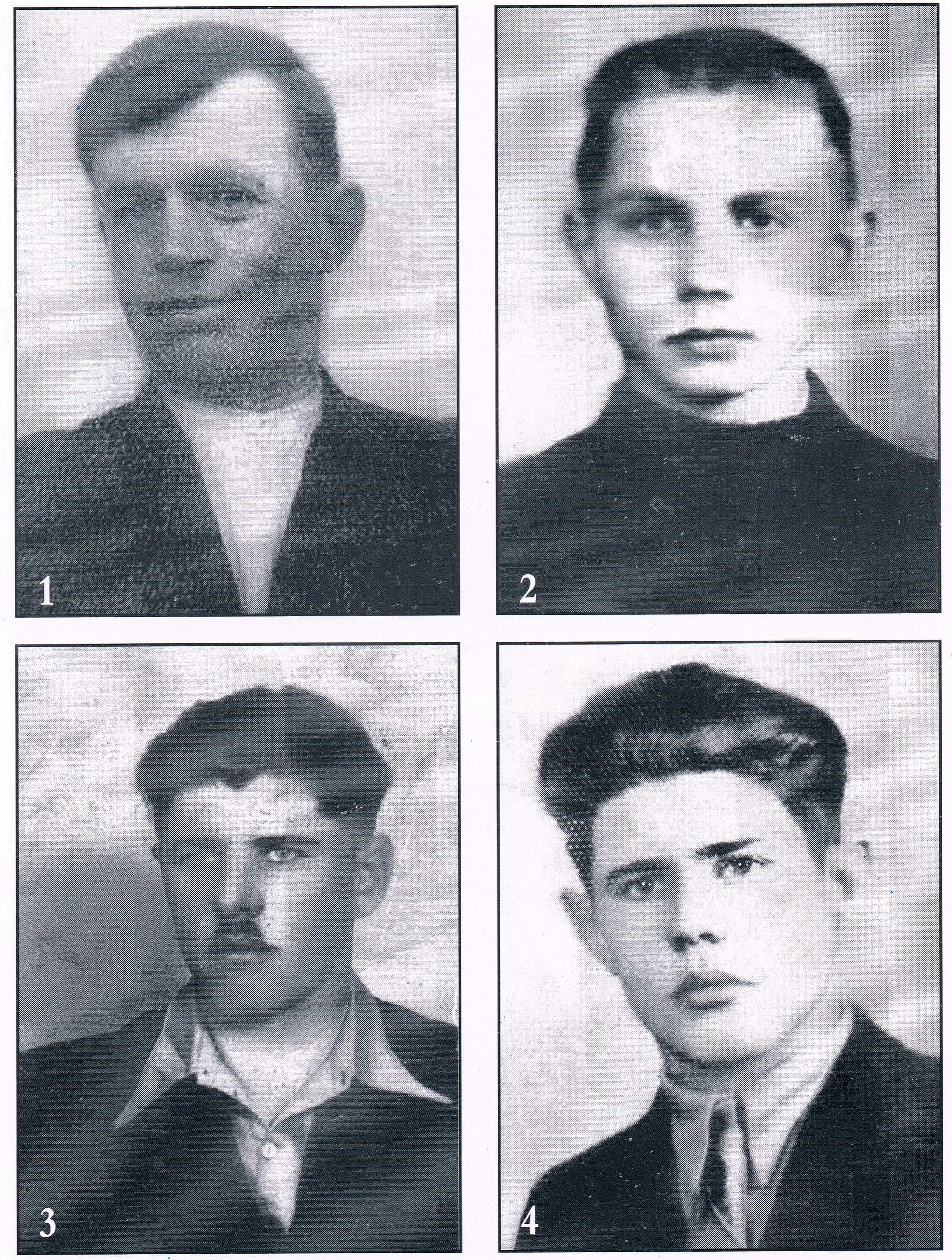 Zamordowani na Rotundzie Zamojskiej 1 kwietnia 1944. Villagers of Pniówek: Władysław Szala, Jan Szala, Antoni Pitak oraz Roman Pitak. Zamordowani na Rotundzie Zamojskiej 1 kwietnia 1944 Zamość Polnad. Killed during WWII by Nazi in Rotunda Zamość, Poland, Europe in 1944.04.01 (form Pniówek willage)